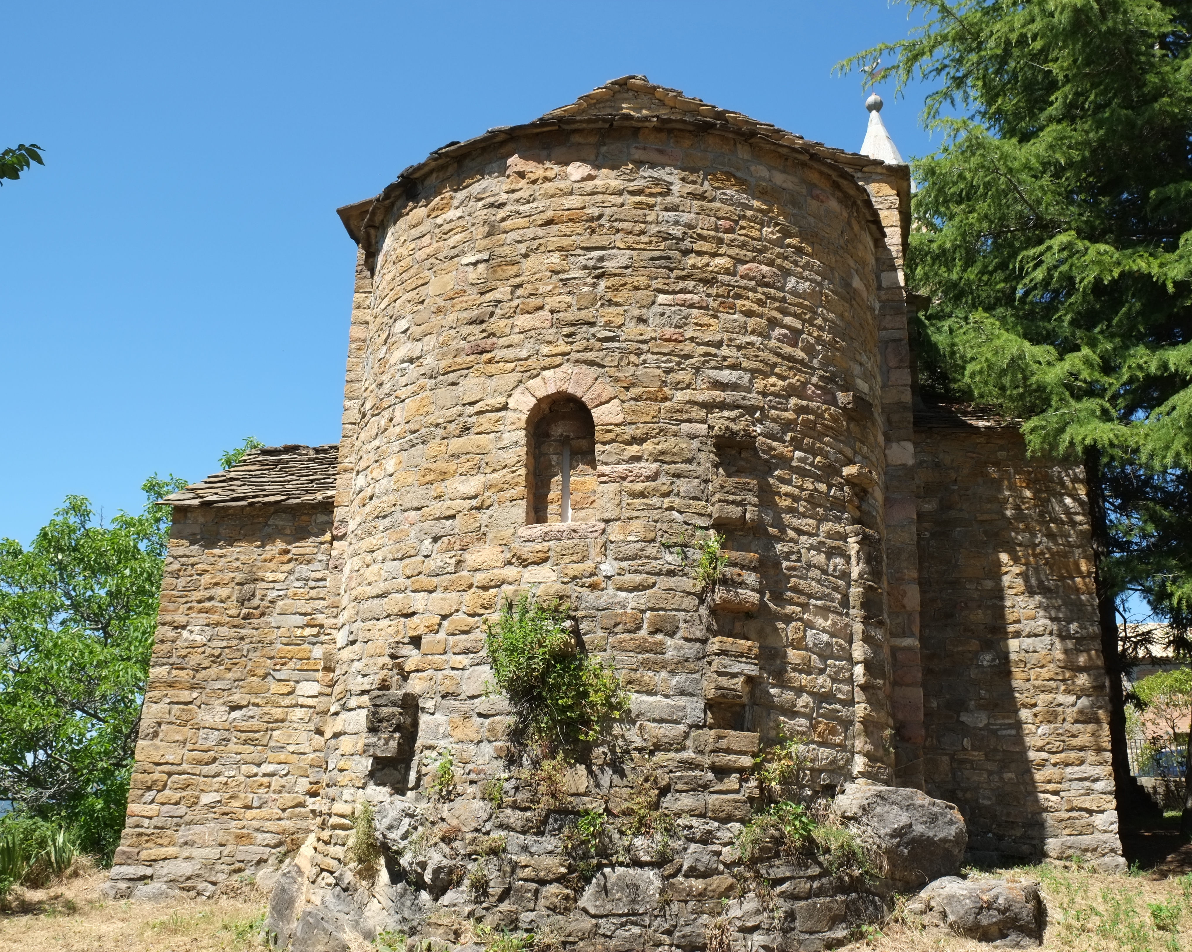 Kirche San Andrés in Calvera in Aragonien (Spanien)